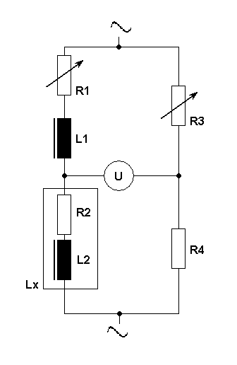 Maxwell-Brückenschaltung. Lx ist die zu bestimmende Induktivität, R2 deren äquvalenter Sereinwiderstand. Mit R1 und R3 Nullabgleich von U